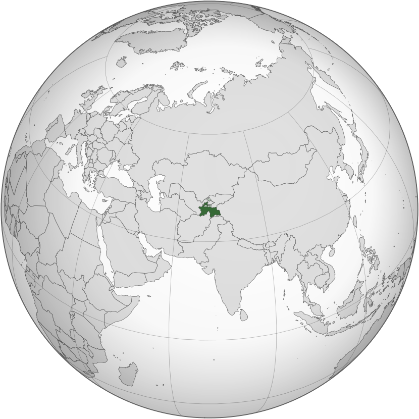 Точикистон дар кураи Замин.